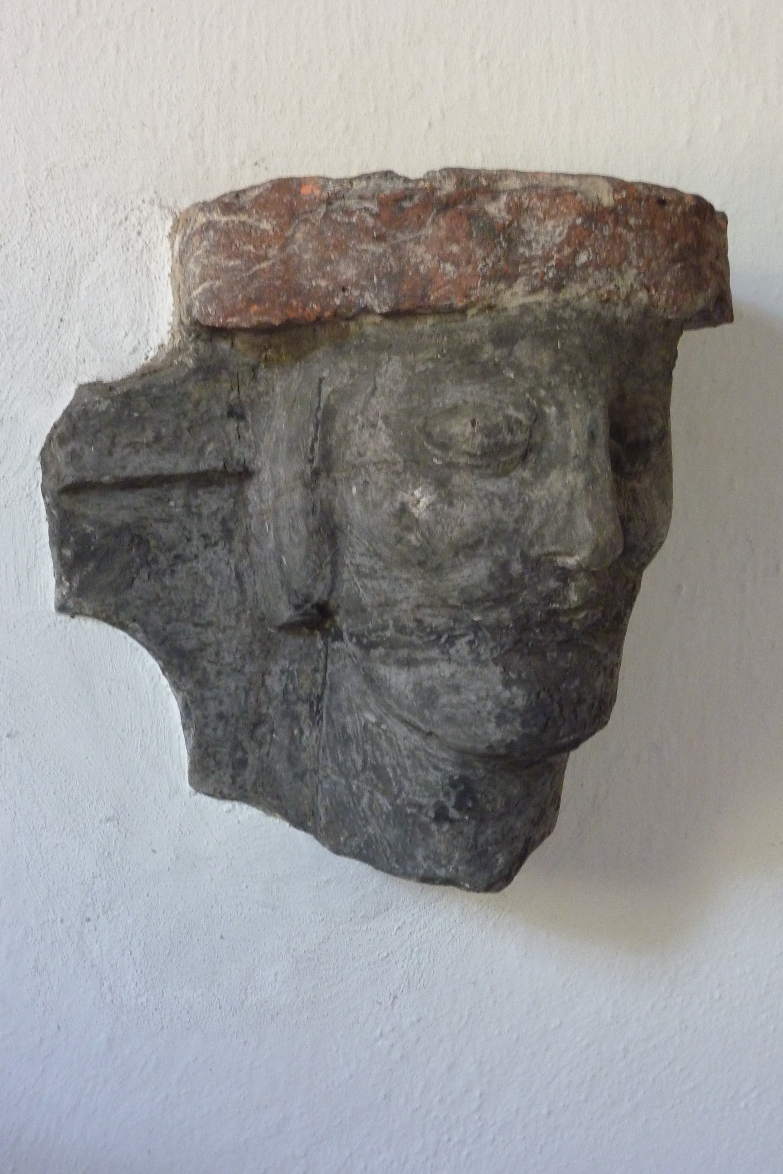 Bleiglasfenster in der katholischen Pfarrkirche St. Martinus in Kirchheim Kopf im Eingangsbereich